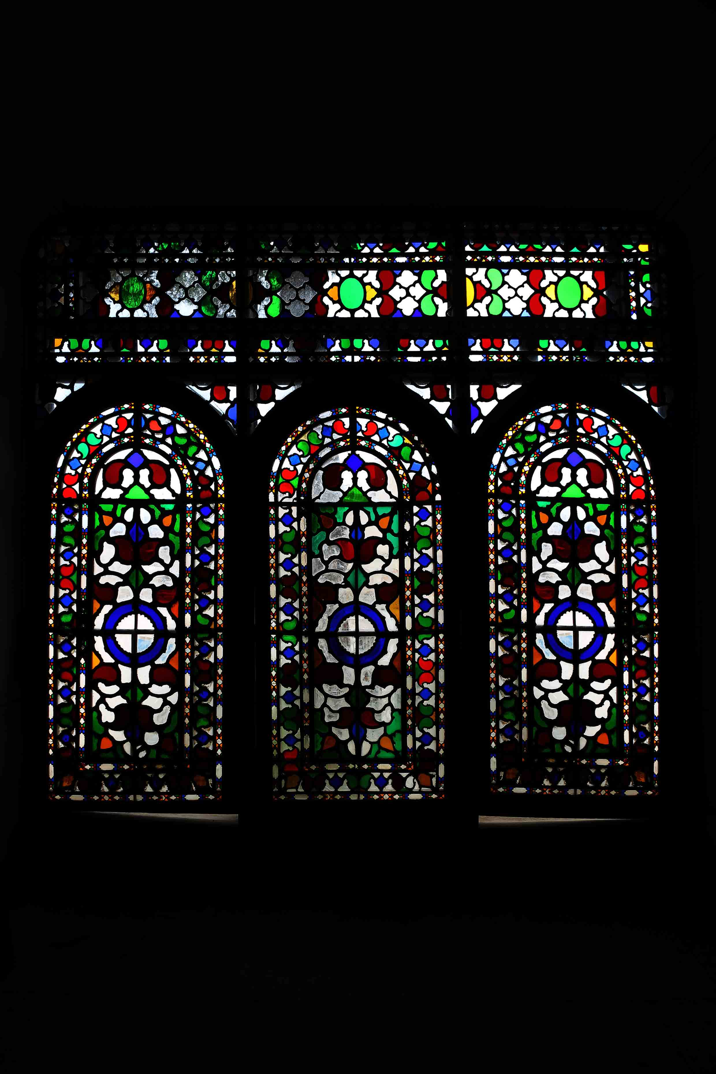 ارسی حرمسرای های خانه مشیرالملک